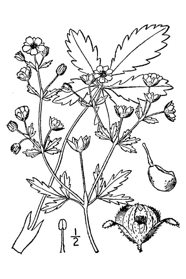 Potentilla intermedia L. - downy cinquefoil